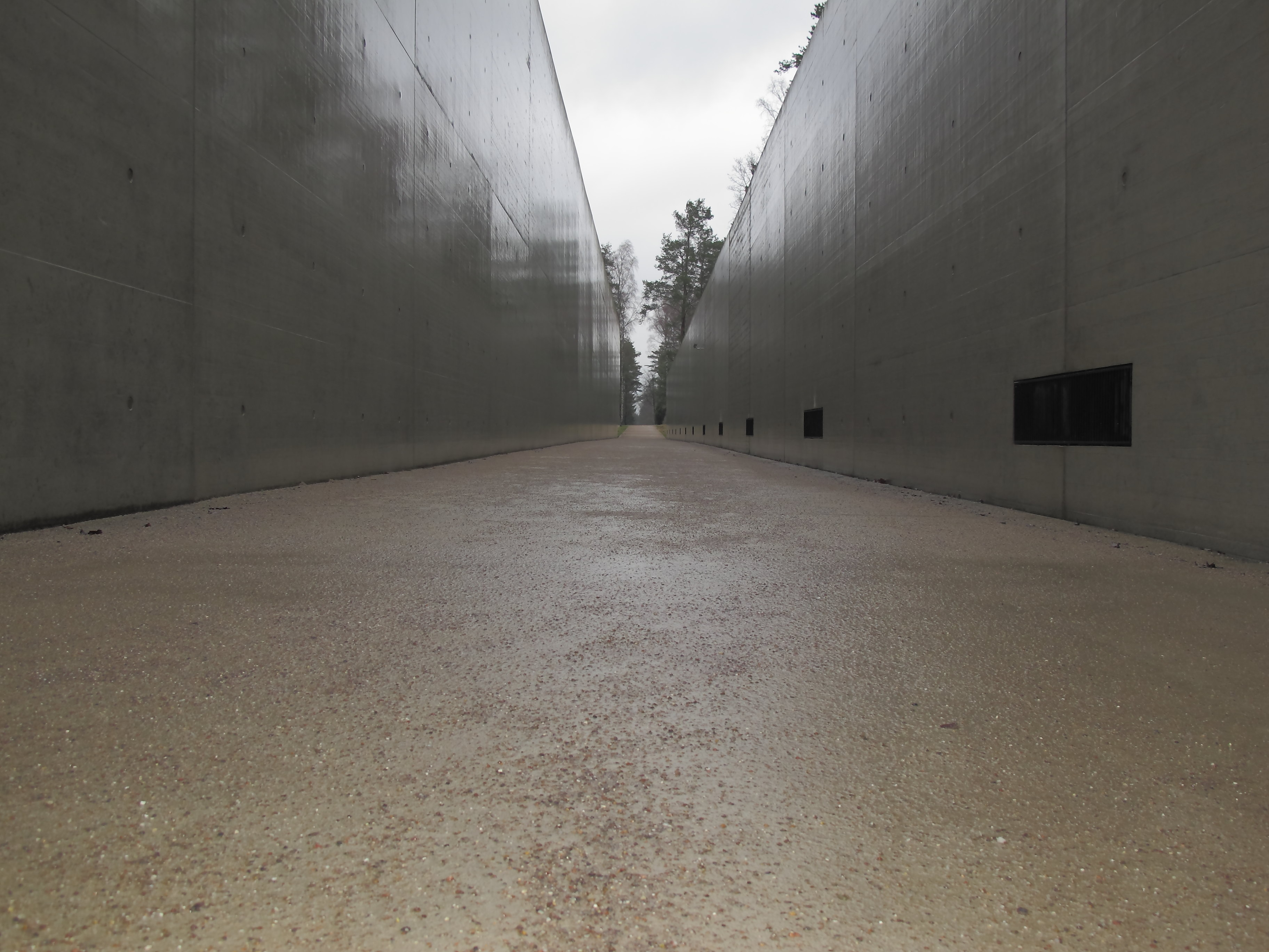 Ehemaliger Weg zum Lager-Blick vom Dokumentationszentrum